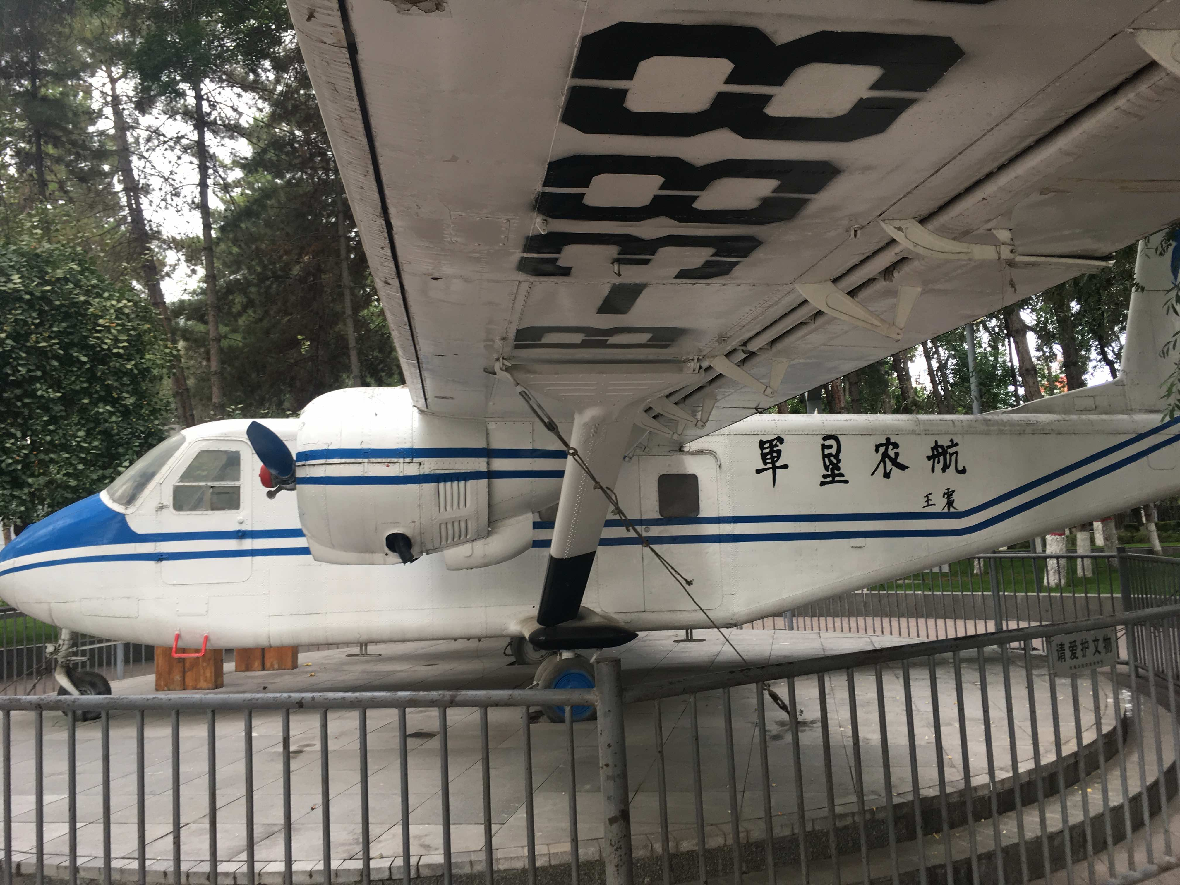 新疆兵团军垦博物馆展示的“运-11”运输机